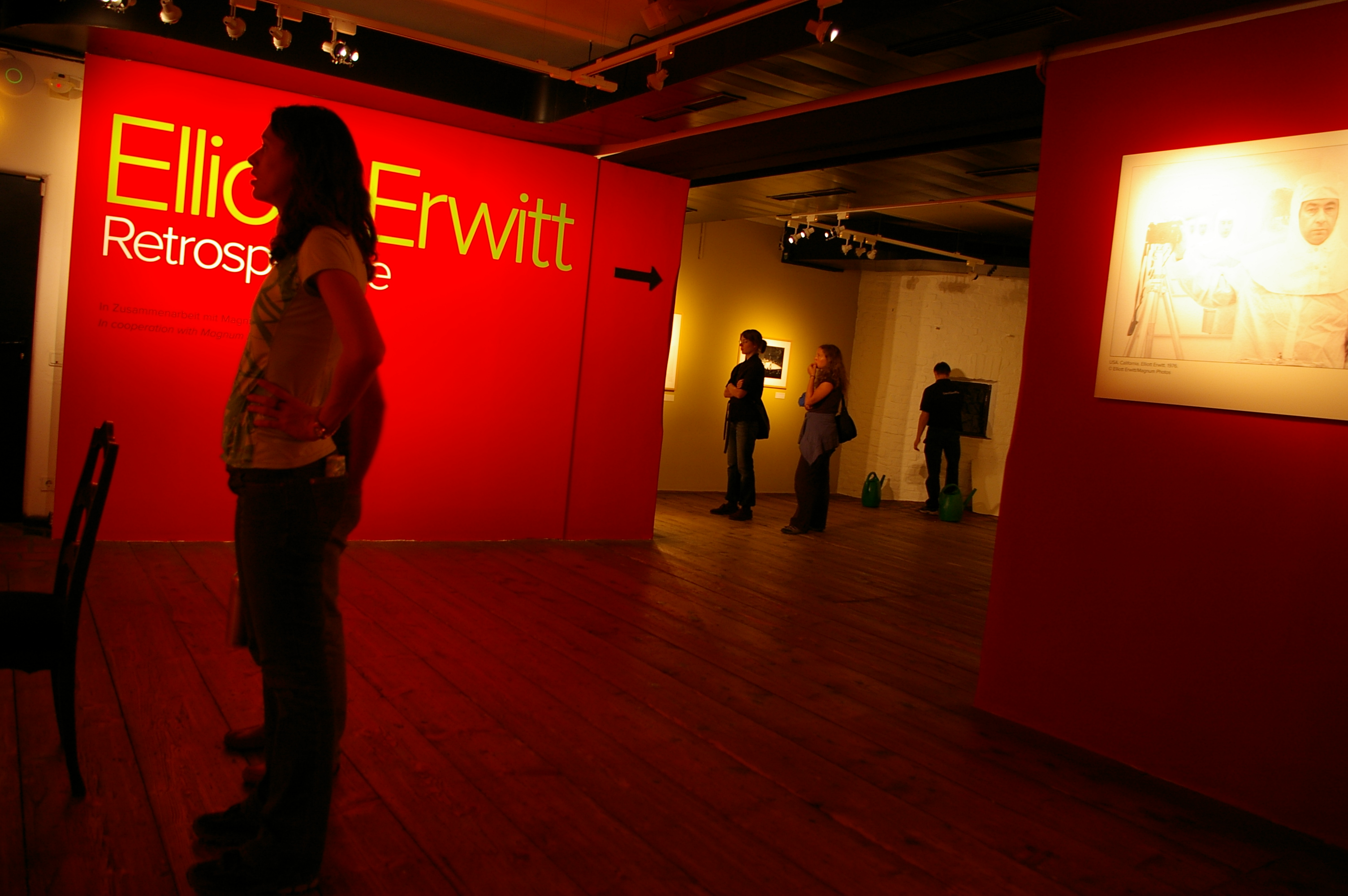 Výstava Elliott Erwitt. Retrospective, KunstHaus, Vídeň, 14. června - 30. září 2012